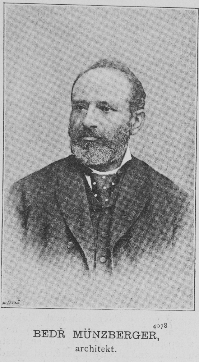 Portrait of Bedřich Münzberger (1846 - 1928), Czech architect.